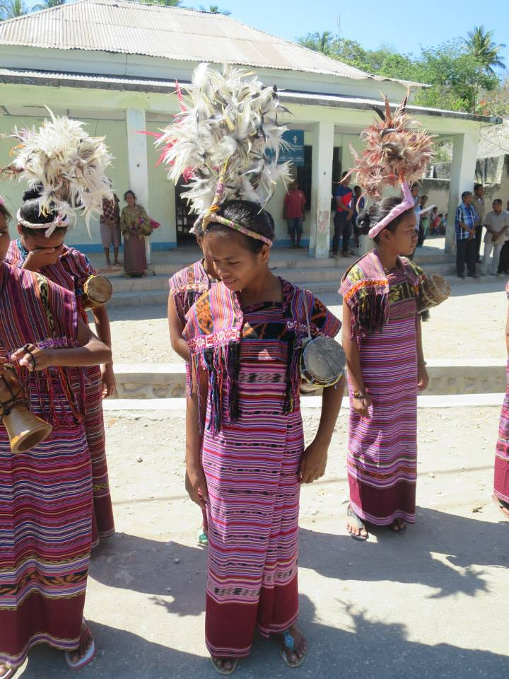 Igreja de S. João Bosco de Laga